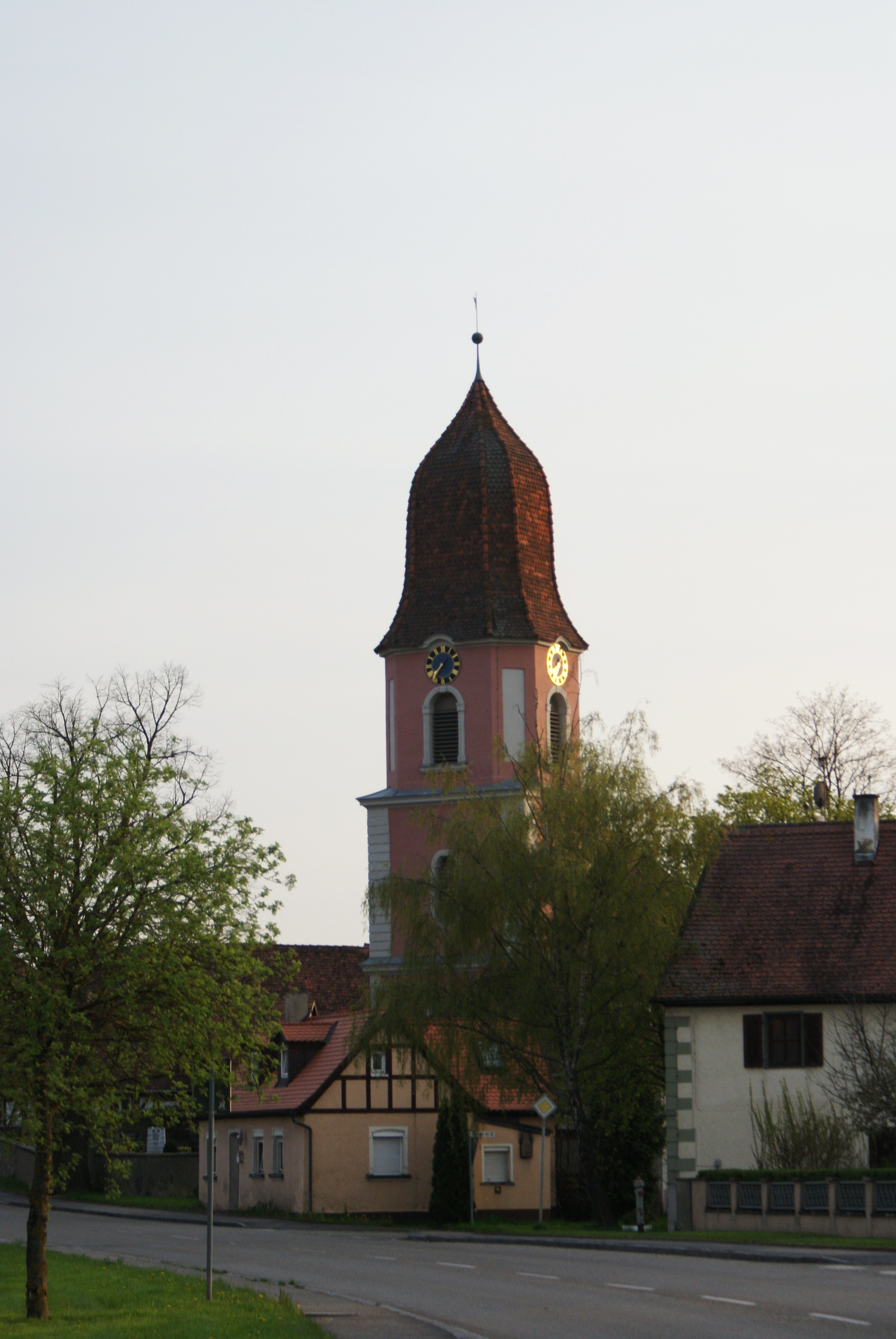 Kirche im Ortsteil Oberndorf (Ipsheim)